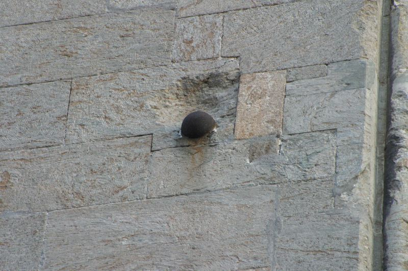 Domkirken i Bergen, Kanonkulen.